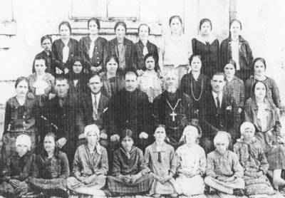 Церковный хор села Калчевы в 1932 году со свя­щенником Константином Кирановым и старо­стой села.